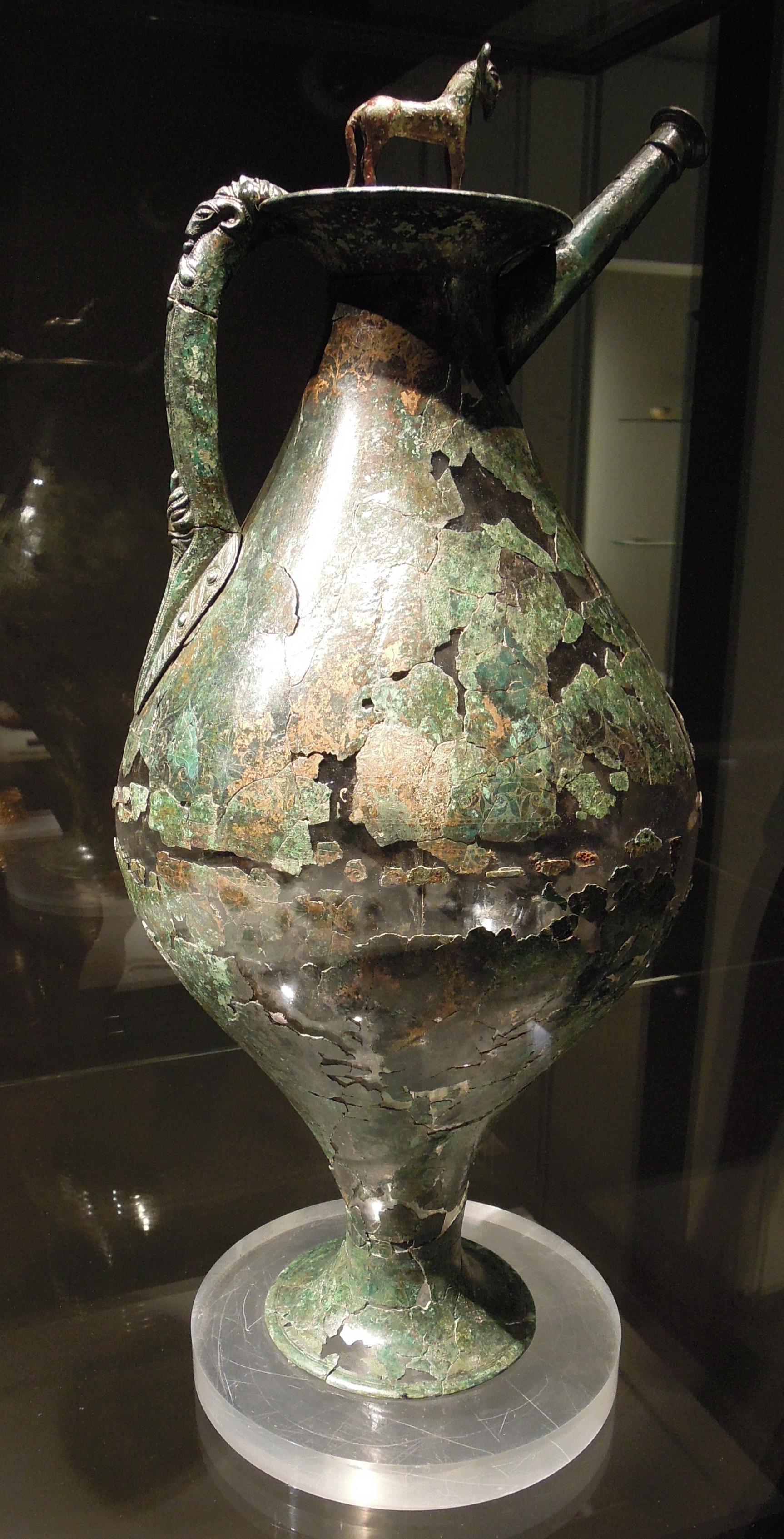 Vor- oder Frühgeschichtlicher Fund aus dem Saarland